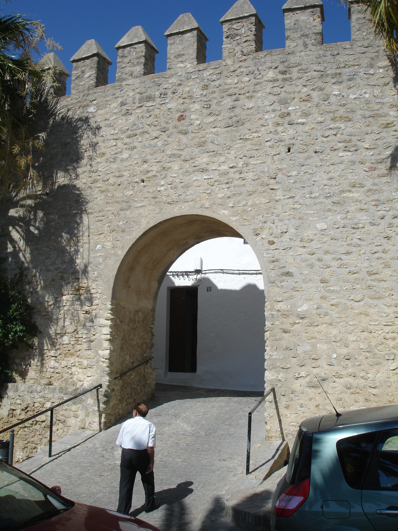 Vejer de la Frontera. Andalusia (Spain)